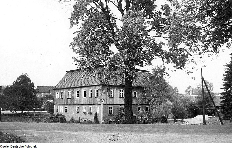 Original image description from the Deutsche FotothekSohland a. d. Spree-Taubenheim/Spree. Niedermühle, Mahl- und Sägemühle, 1782-1945, Wasserkraftnutzung bis 1930